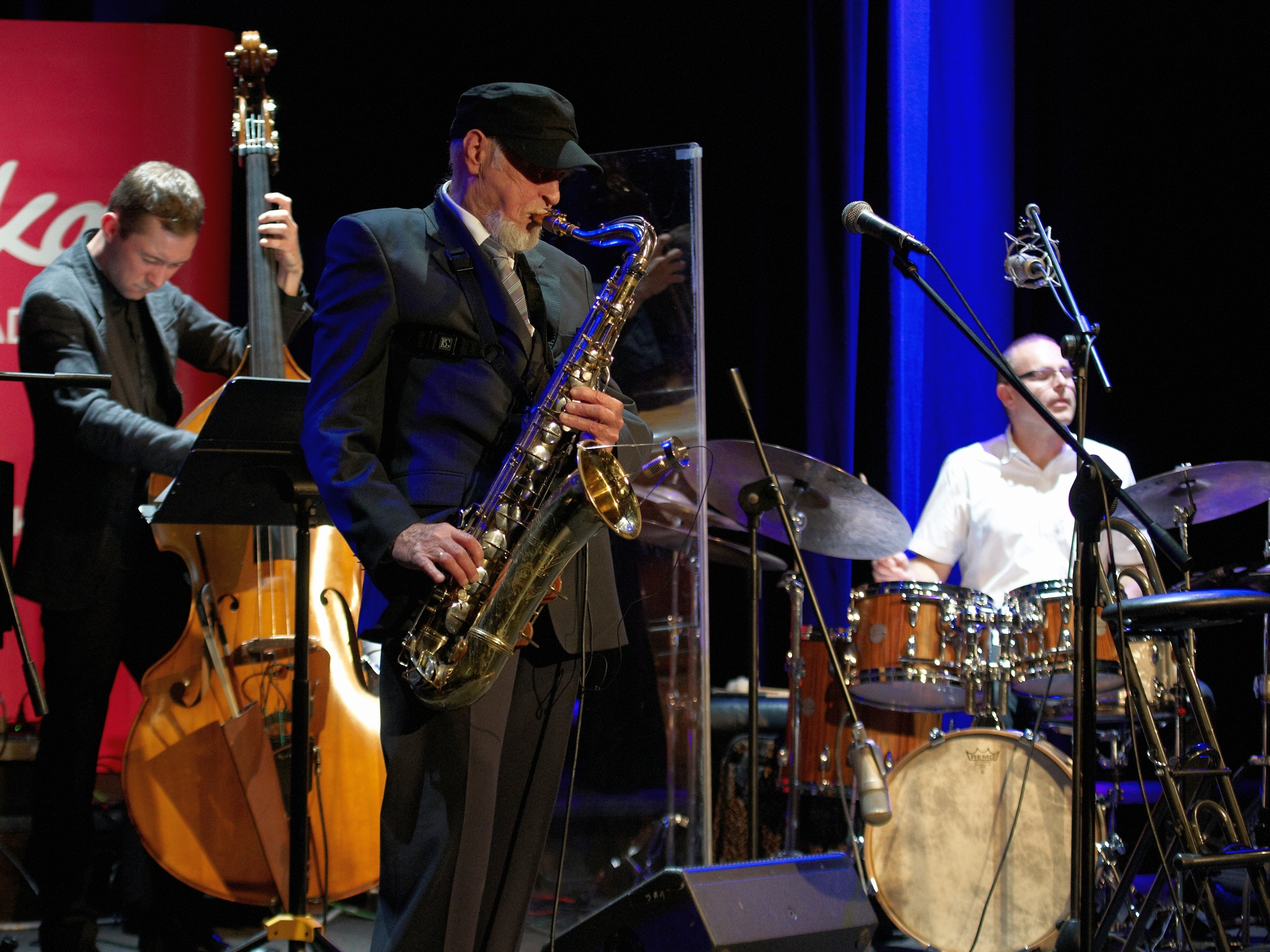 Jan "Ptaszyn" Wróblewski (w tle: po lewej - Michał Kapczuk, po prawej - Marcin Jahr), Muzyczne Studio Polskiego Radia im. Agnieszki Osieckiej, Warszawa 2013.